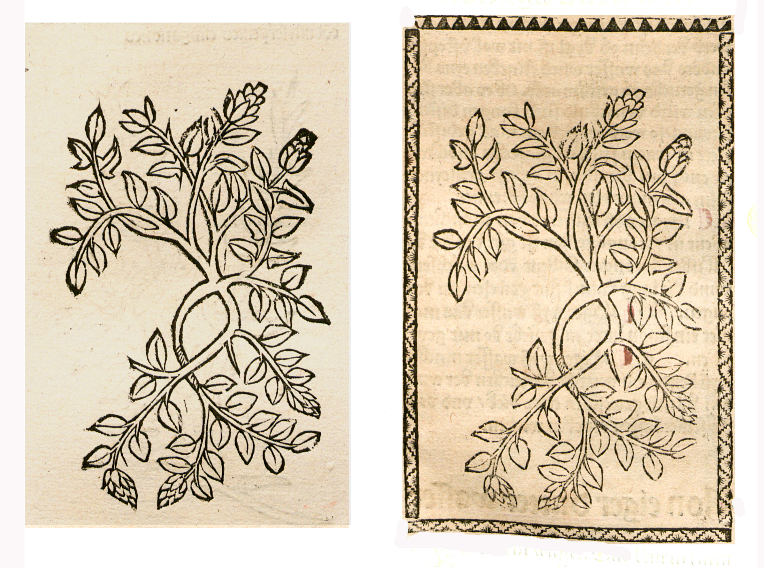 Abbildung von: Egil Krut